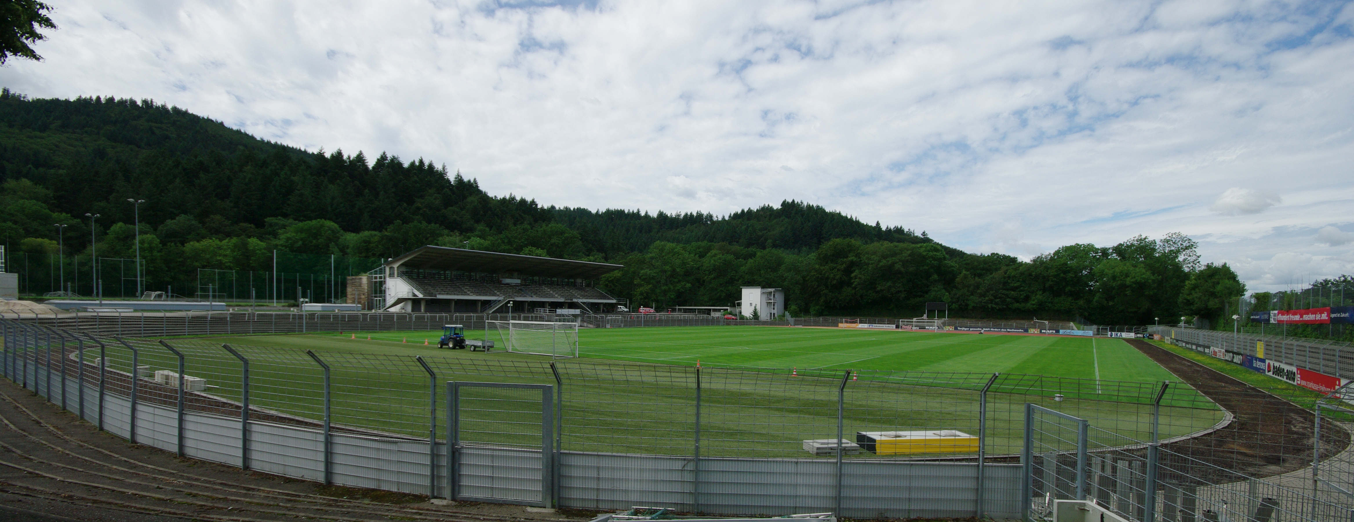 Das Mösle-Stadion in Freiburg